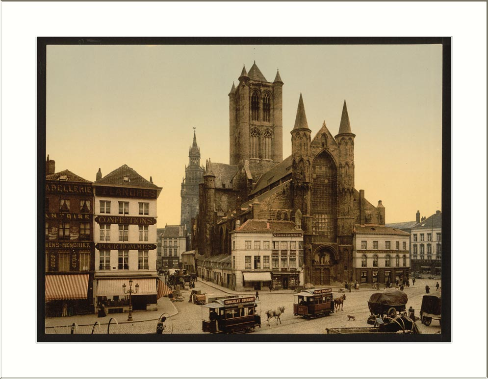 St. Nicolas Church in Ghent, Belgium